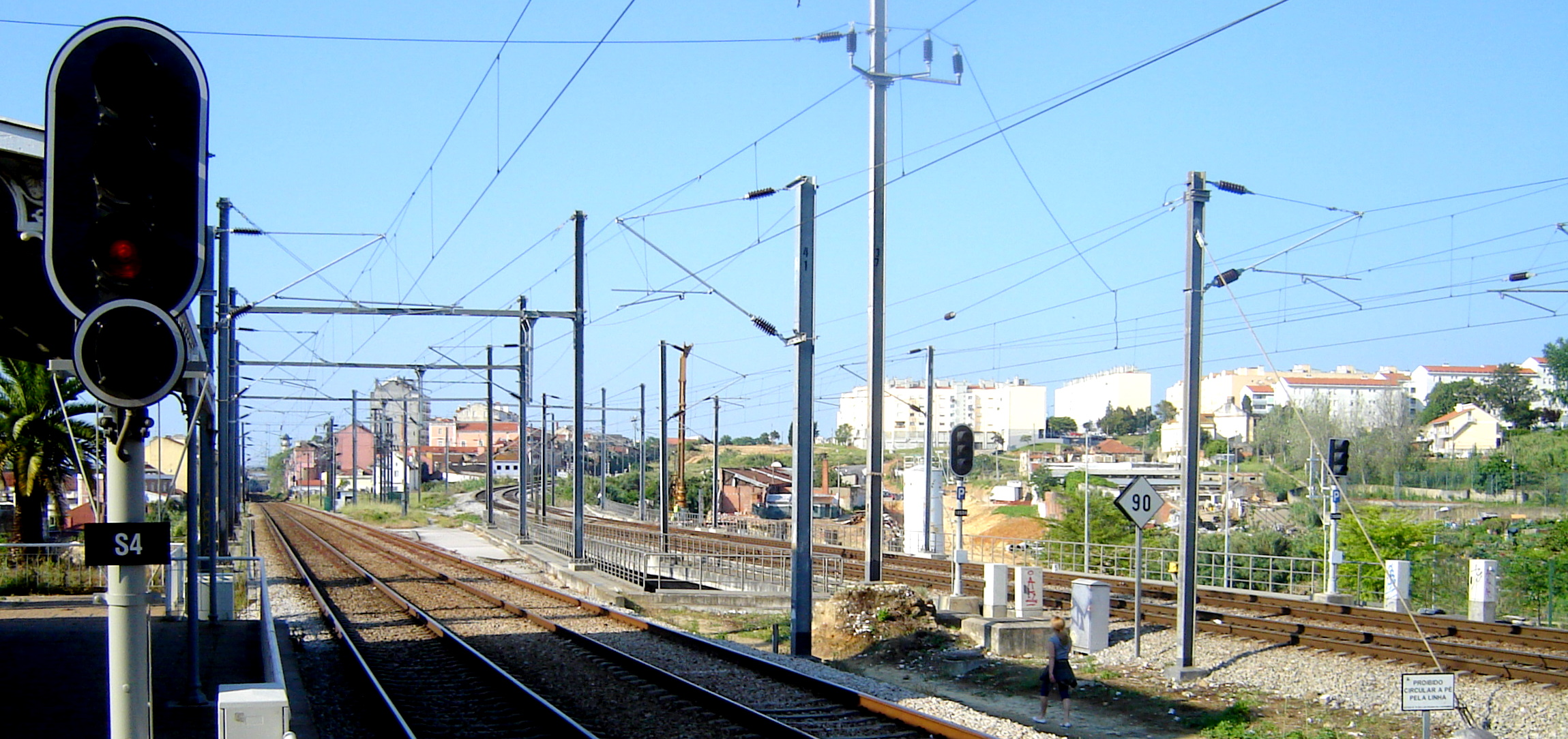 Bifurcação das linhas na Estação ferroviária de Braço de Prata